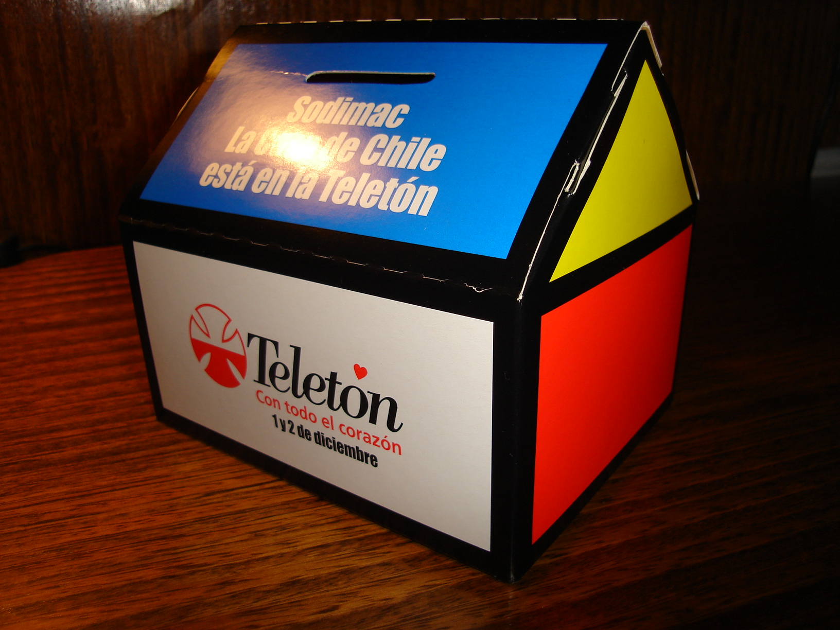 Alcancía Teletón 2006